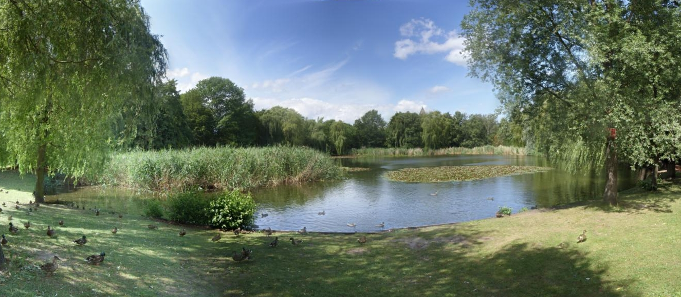 Panorama Dorfteich Lichtenrade, erstellt mit Hilfe der Software autostitch